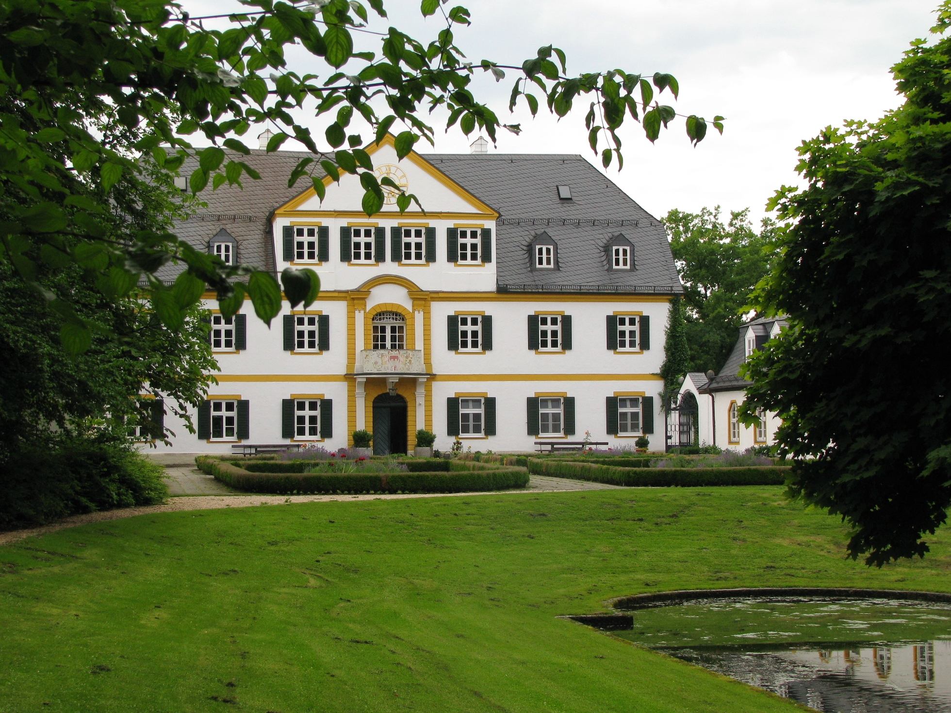 Schloss Maxhofen This is a photograph of an architectural monument.